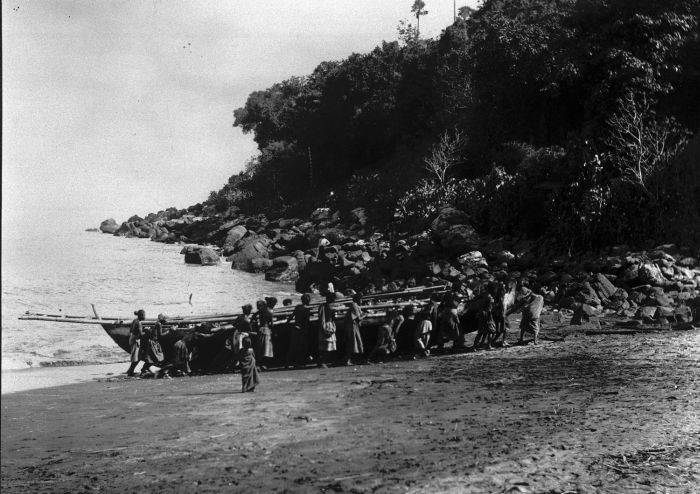 Foto. Walvisvaarders trekken hun prauw op het strand aan de zuidkust van Poelau Lomblen